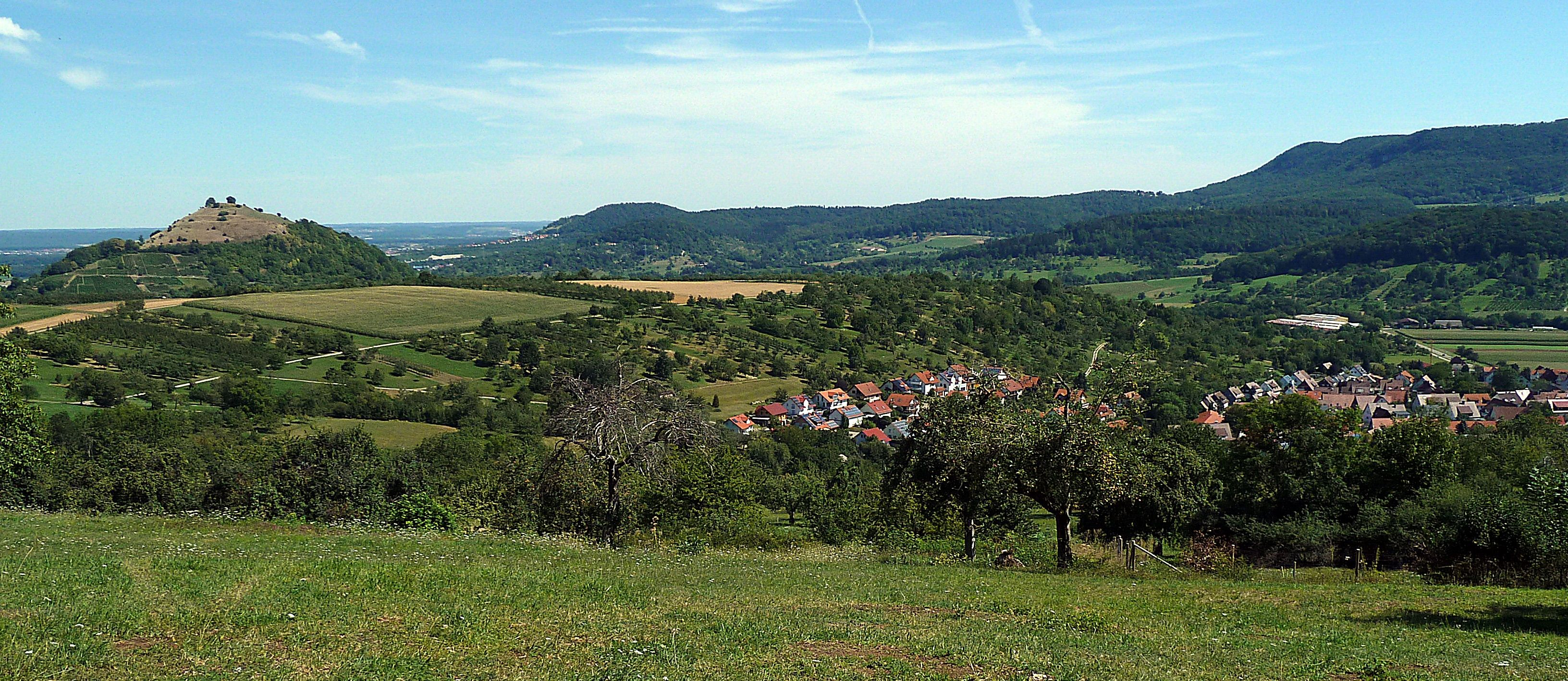 Blick auf Hepsisau mit Limburg